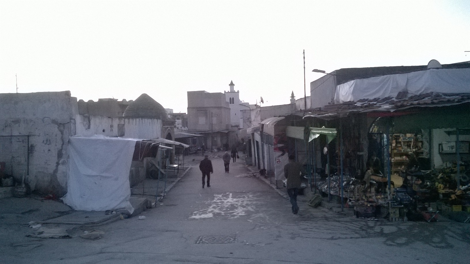 Bab Sidi Abdessalem , Tunis باب سيدي عبد السلام ، تونس